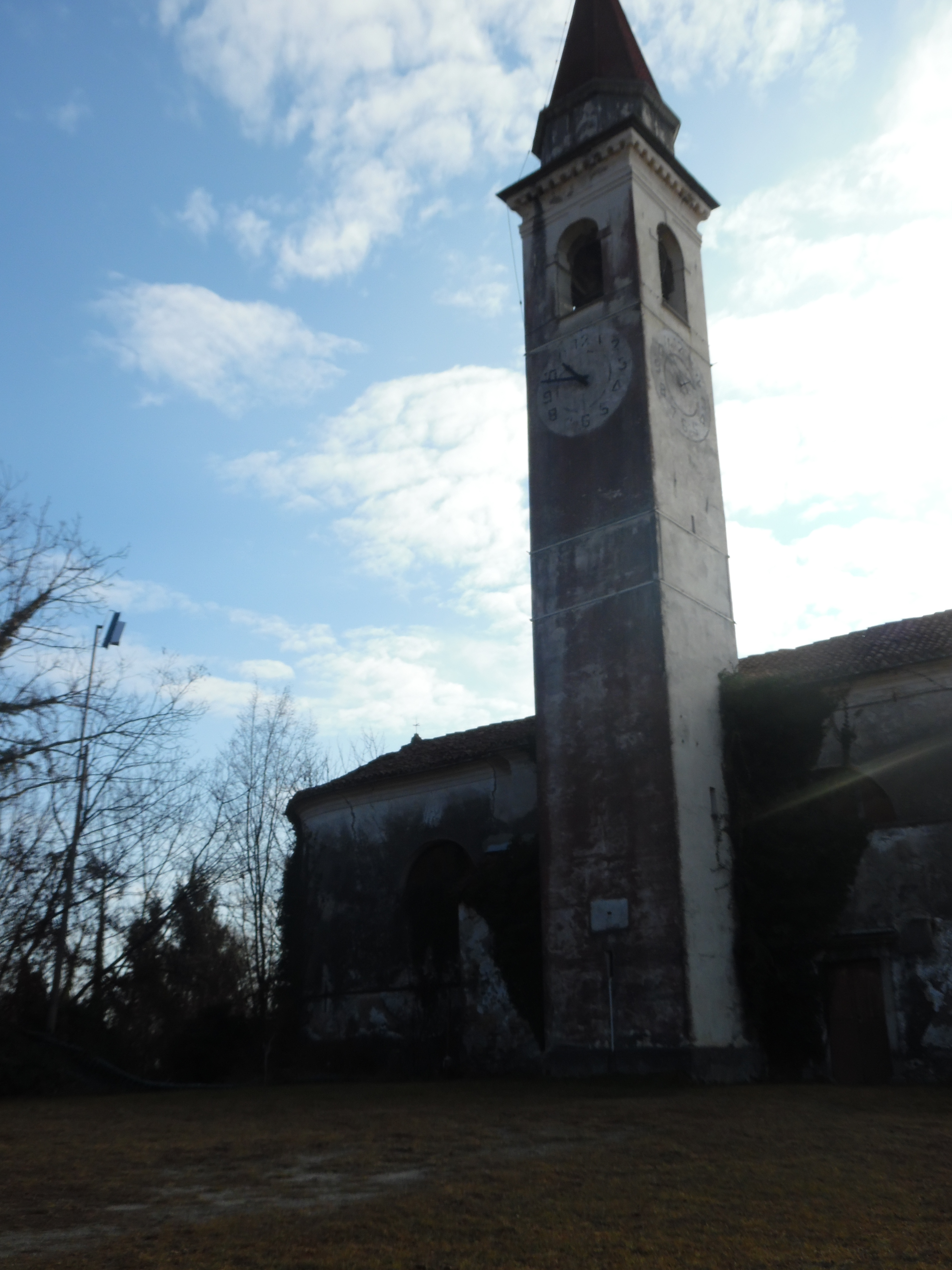 A.Roldo